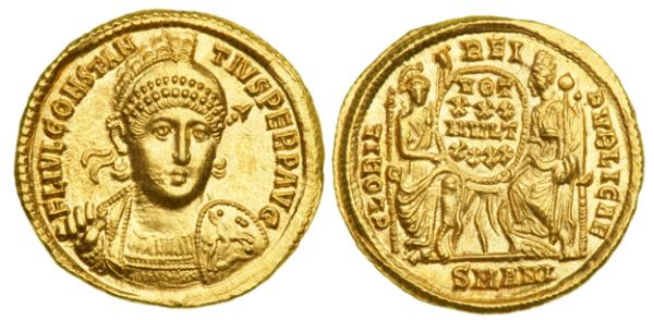 Constantius II AV Solidus. 355-361 AD. FL IVL CONSTANTIVS PERP AVG, helmeted, cuirassed bust facing holding spear behind head & sheild. GLORIA REPVBLICAE, Roma & Constantinople holding sheild between them inscribed VOT XXX MVLT XXXX, SMANA in exergo